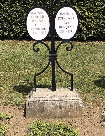 Tombe de Raymond Poincaré, président de la République française et de son épouse au cimetière de Nubécourt dans la Meuse.